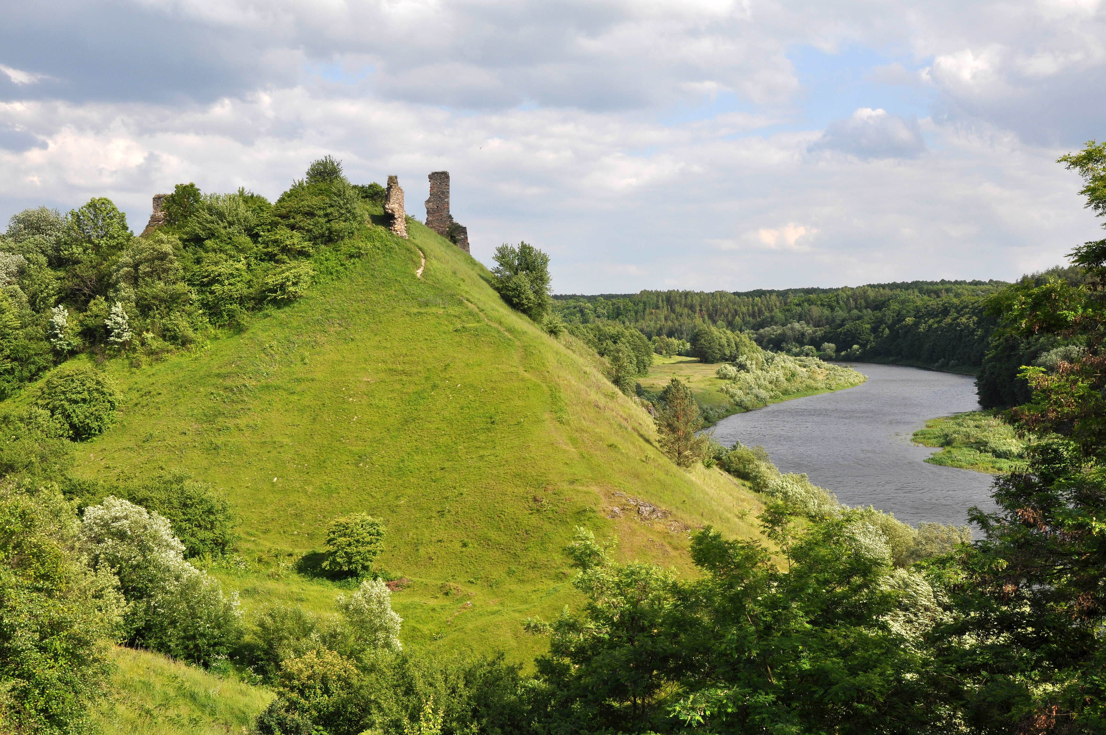 Руїни замку (мур.), с.Губків